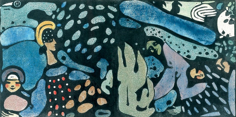 The Green Womenlabel QS:Len,"The Green Women" label QS:Lde,"Die Grüne Frauen"